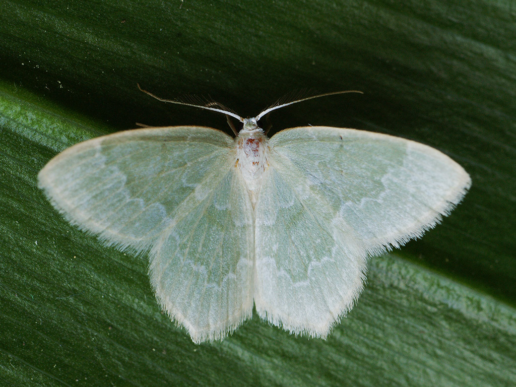 Exemplar found: Russia, Moscow Oblast, Orekhovo-Zuyevsky District, near station Nerskaya, 07.06.2017, days МО, Орехово-Зуевский р-н, окрестности станции Нерская, 07.06.2017, днём